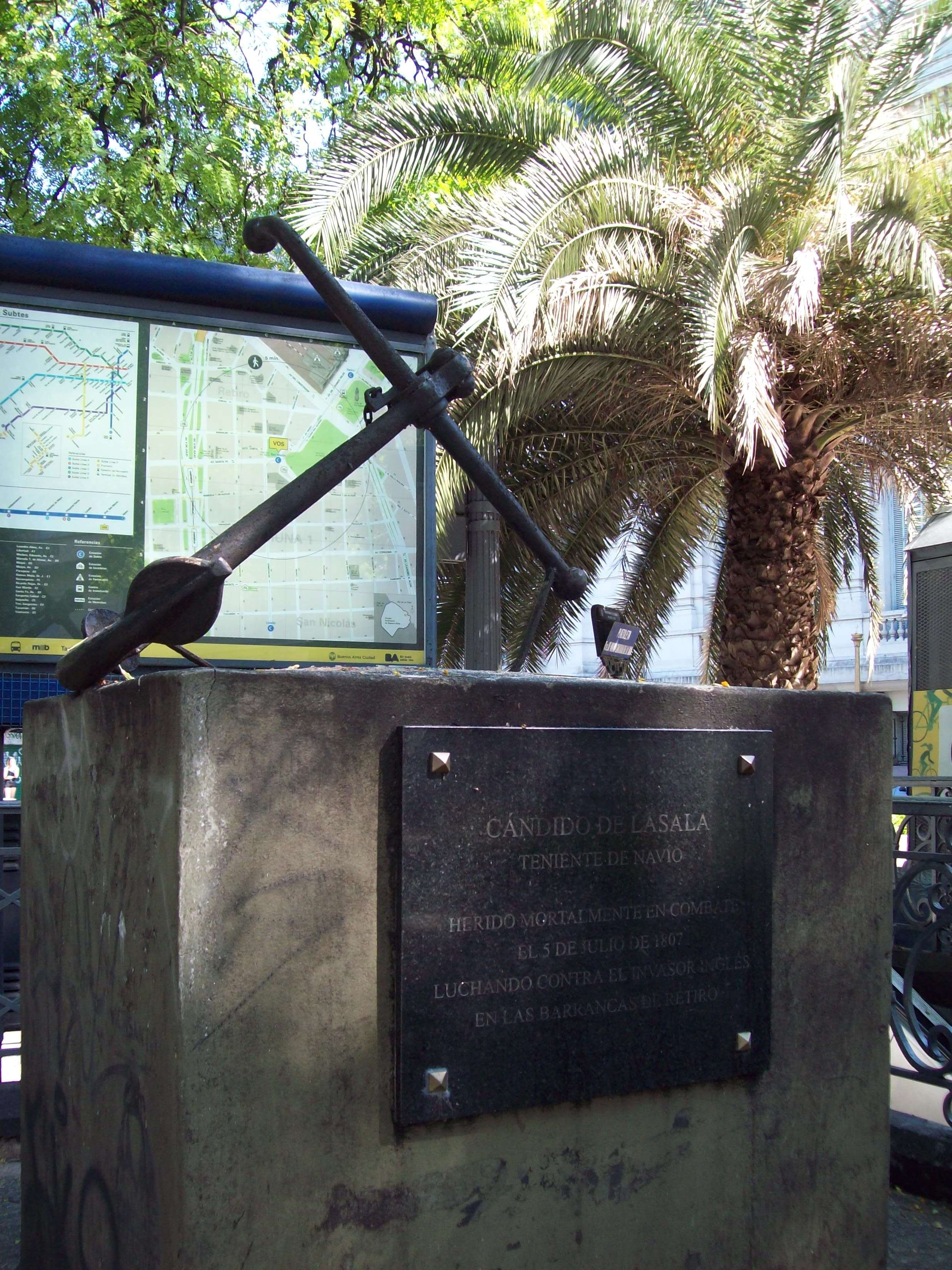 Monumento a Cándido de Lasada en las cercanías de Plaza San Martín, Retiro, Buenos Aires.